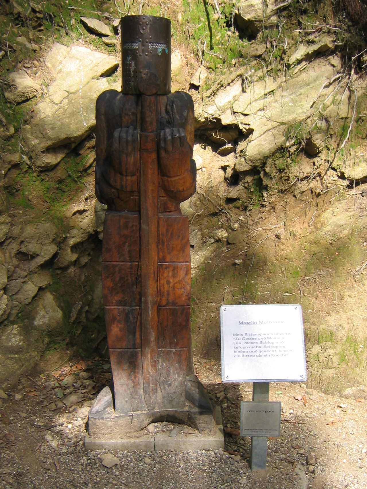 Holzfigur von Martin Malterer auf dem Weg zur Burg in Waldkirch